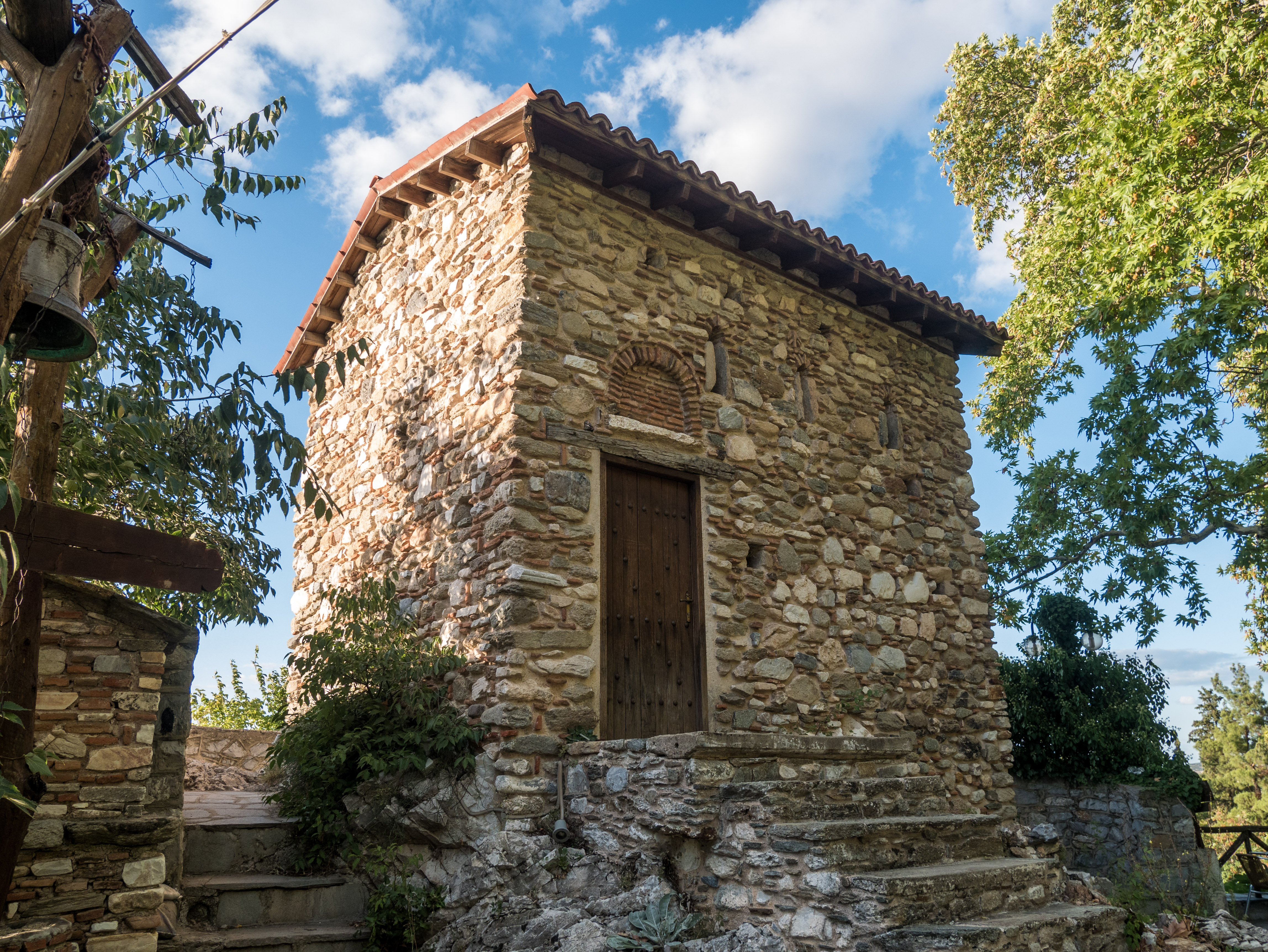 Ναός Αγίων Αναργύρων Σερβίων«Ναός Αγίων Αναργύρων Σερβίων»